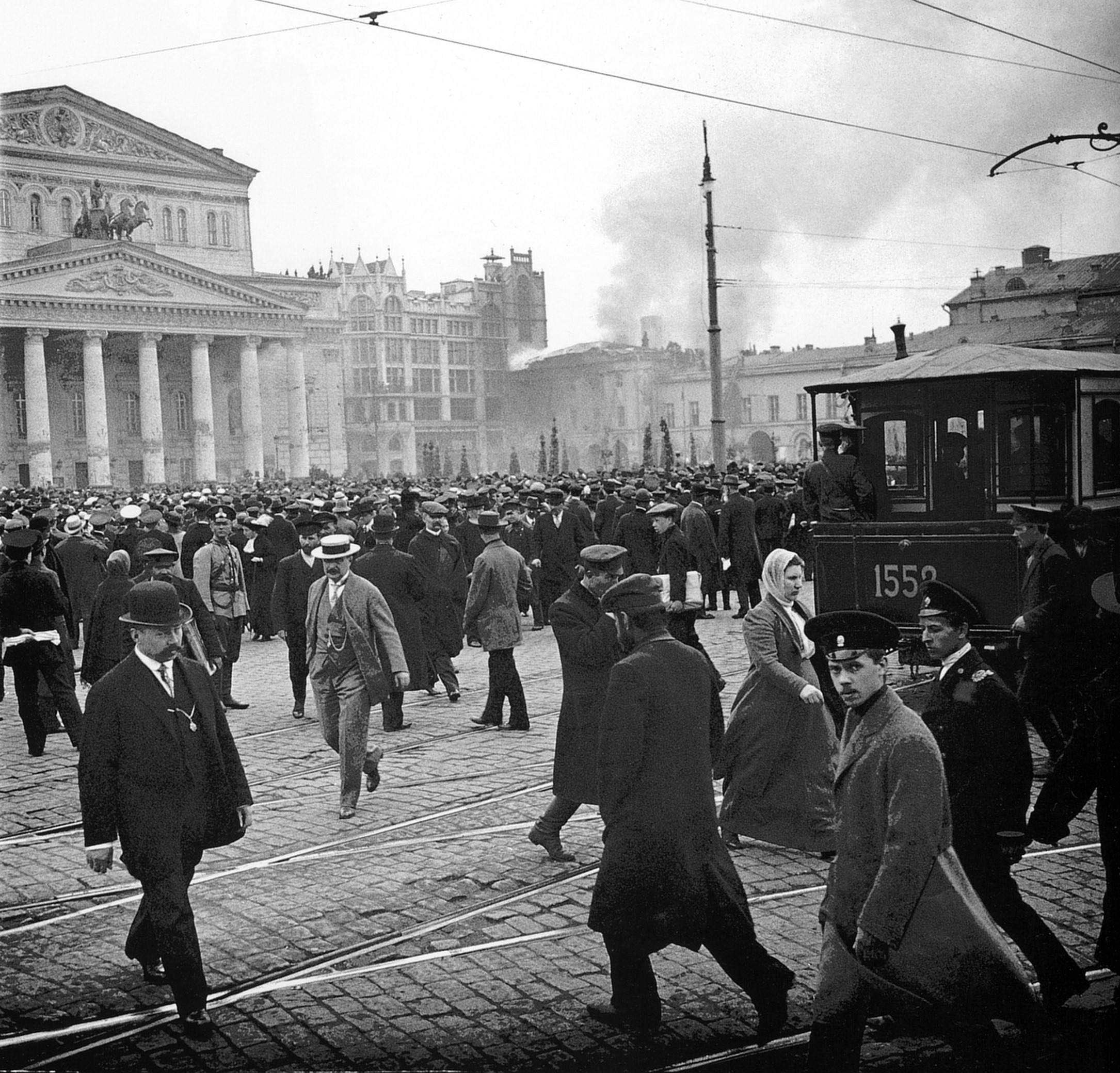 Пожар в Малом театре, 2 мая 1914 года